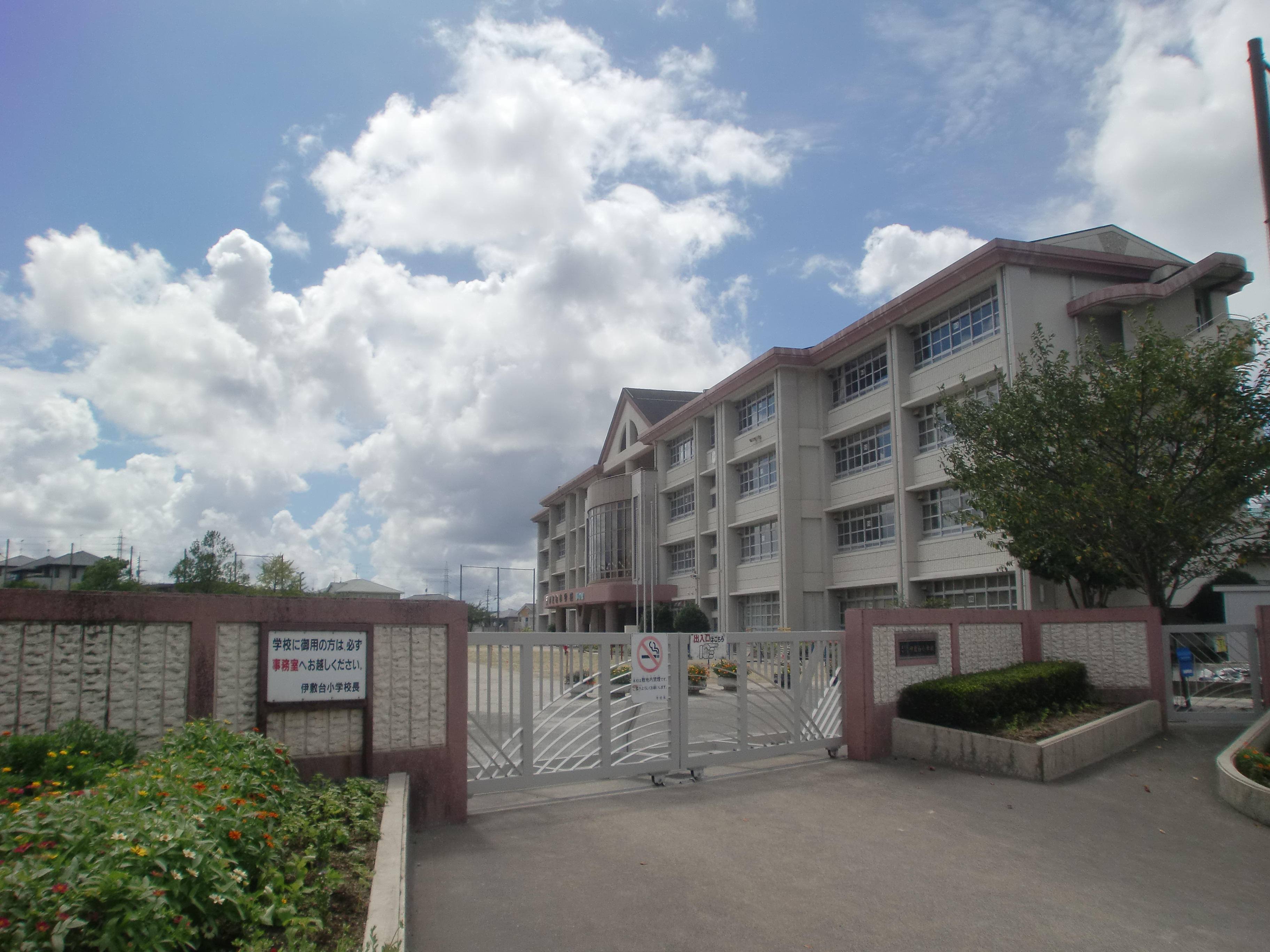 鹿児島市立伊敷台小学校の外観